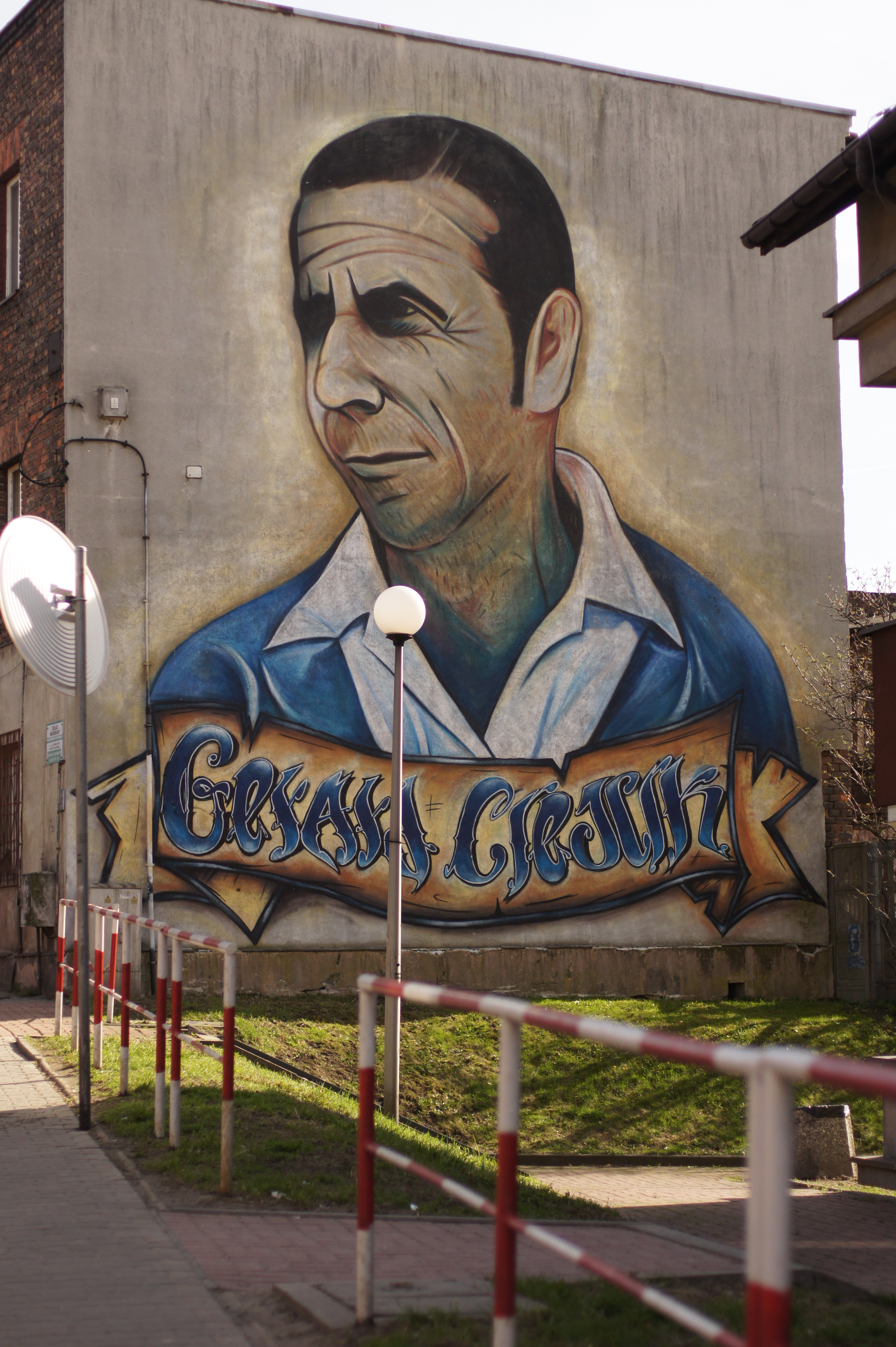 Mural z wizerunkiem Gerarda Cieślika w Chorzowie przy ul. Miarki 21